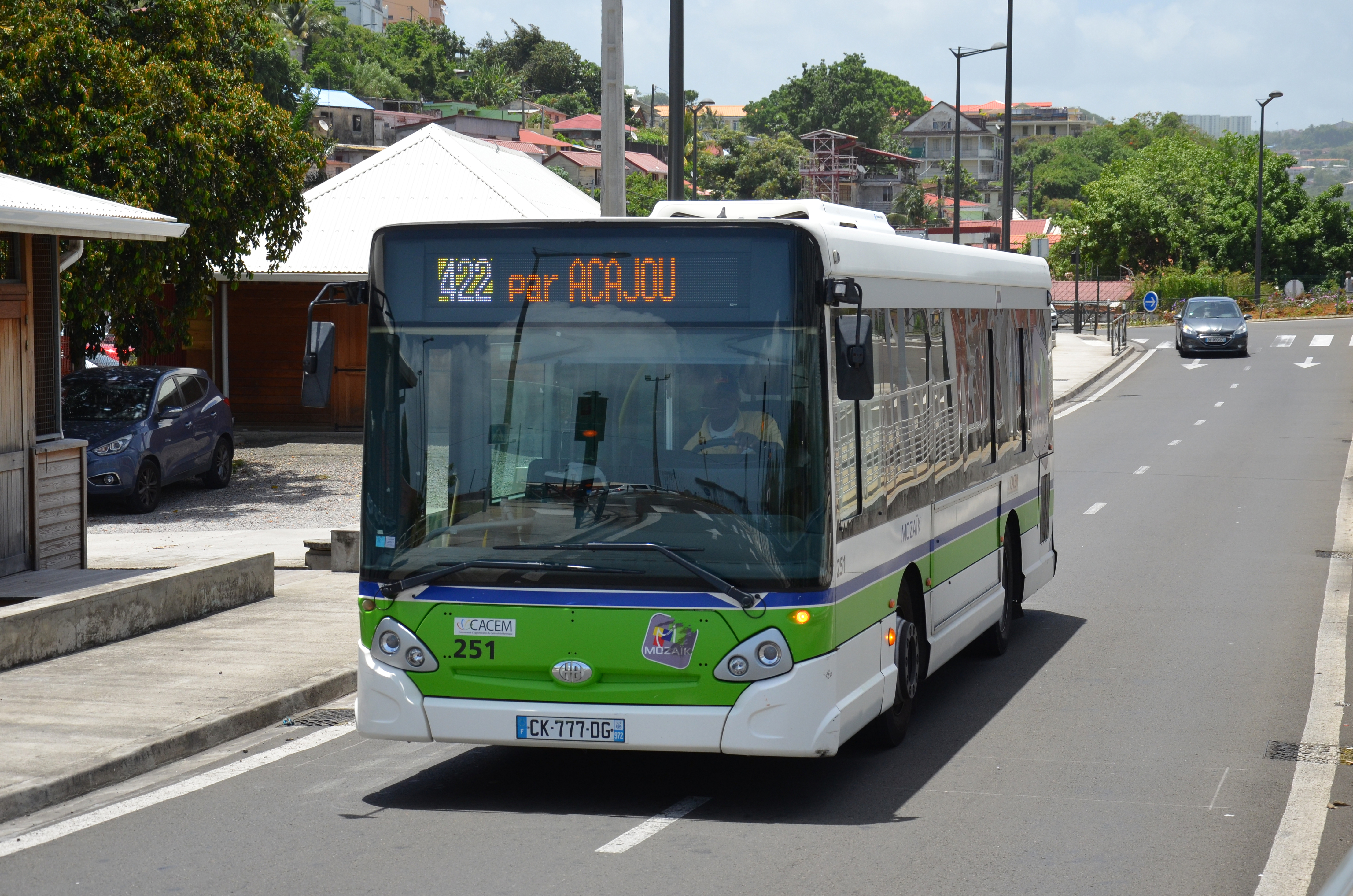 Heuliez GX 327 n°251 MOZAIK sur la ligne 422 arrivant près de son terminus à Fort-de-France, Pointe Simon (Martinique).